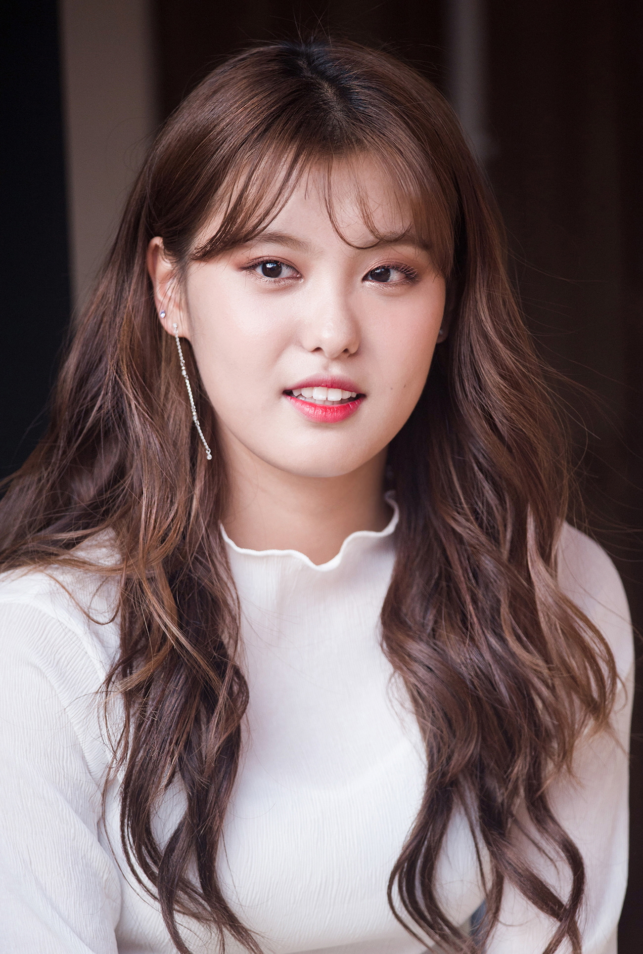 170528 200일 팬미팅 아인